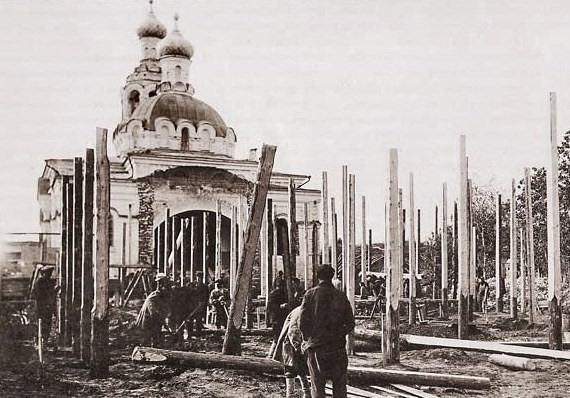 "Перестройка" под столовую церкви в посёлке Караваево города Казани (бывшем селе Караваево Каймарской волости Казанского уезда Казанской губернии) в начале 1930-х гг.